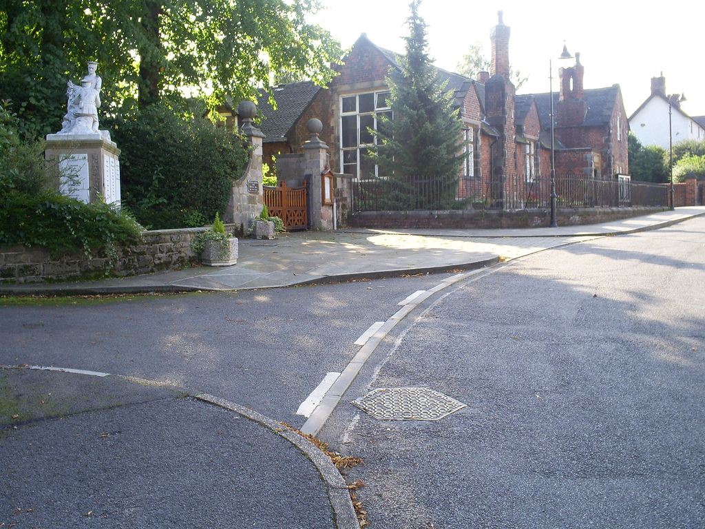 West Hallam Village